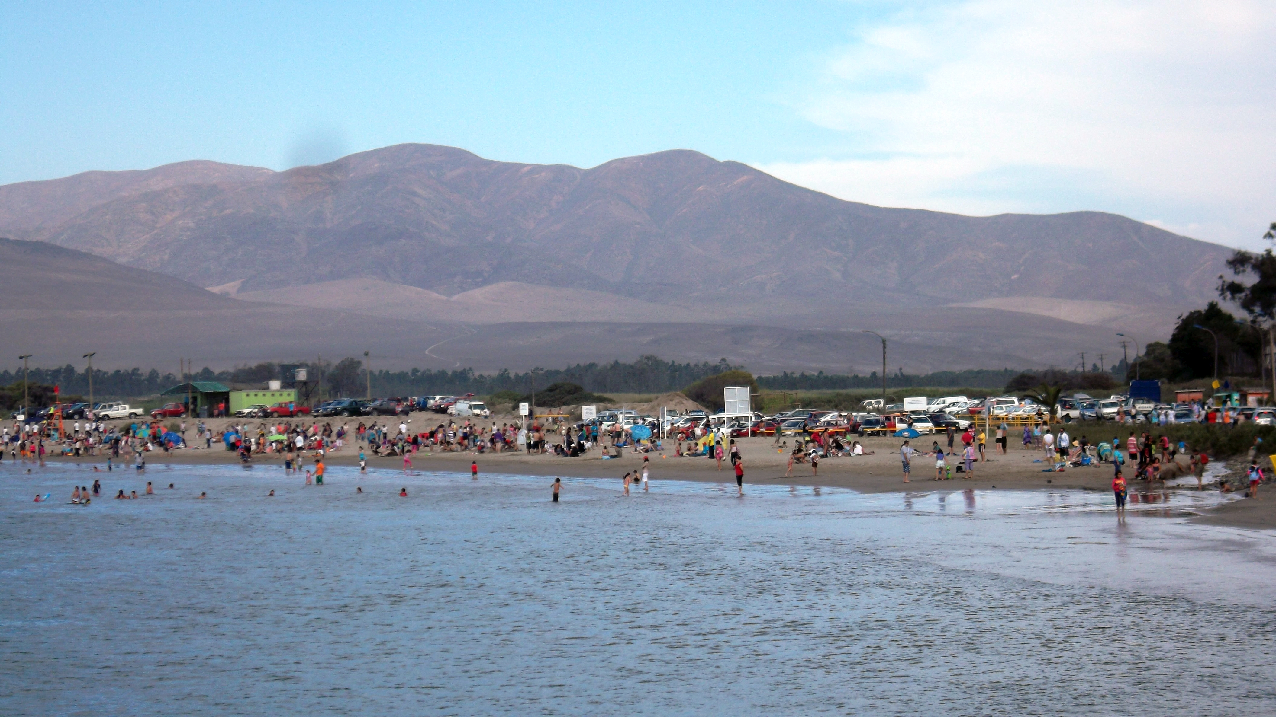 Huasco - III región de Chile